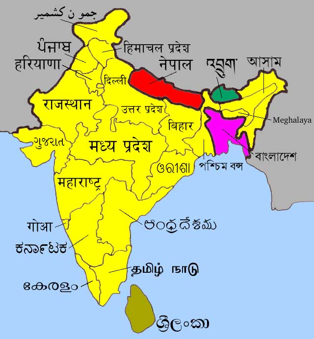 Hindistanda konuşulan dillerinin eyaletlerine göre yazılışı ve isimleri. Almanca Wikipediadan alınmıstir. GFDLe uygundur.